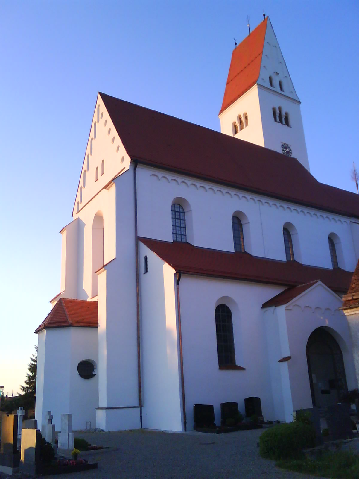 Bayern Schwaben Unterallgäu Kirchhaslach Kirche von SW